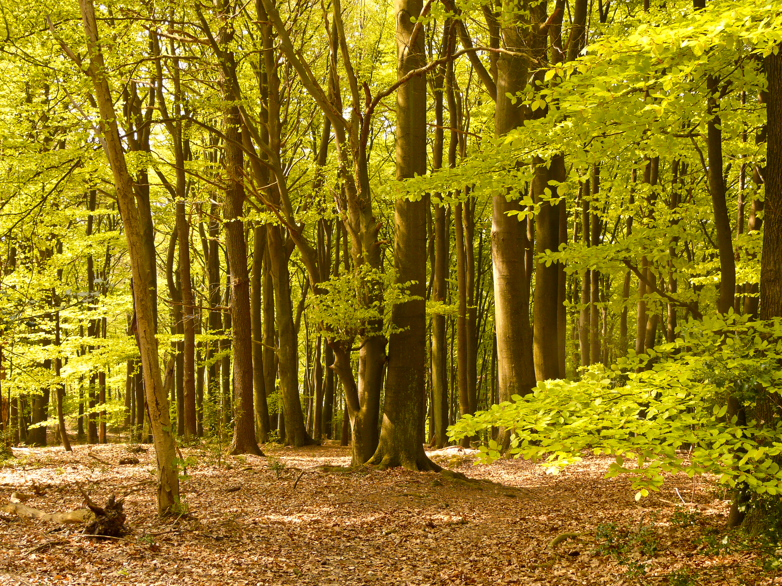 Frühlingshafter Buchenwald in der Naturwaldzelle Meersiepenkopf im Staatsforst Burgholz in Wuppertal